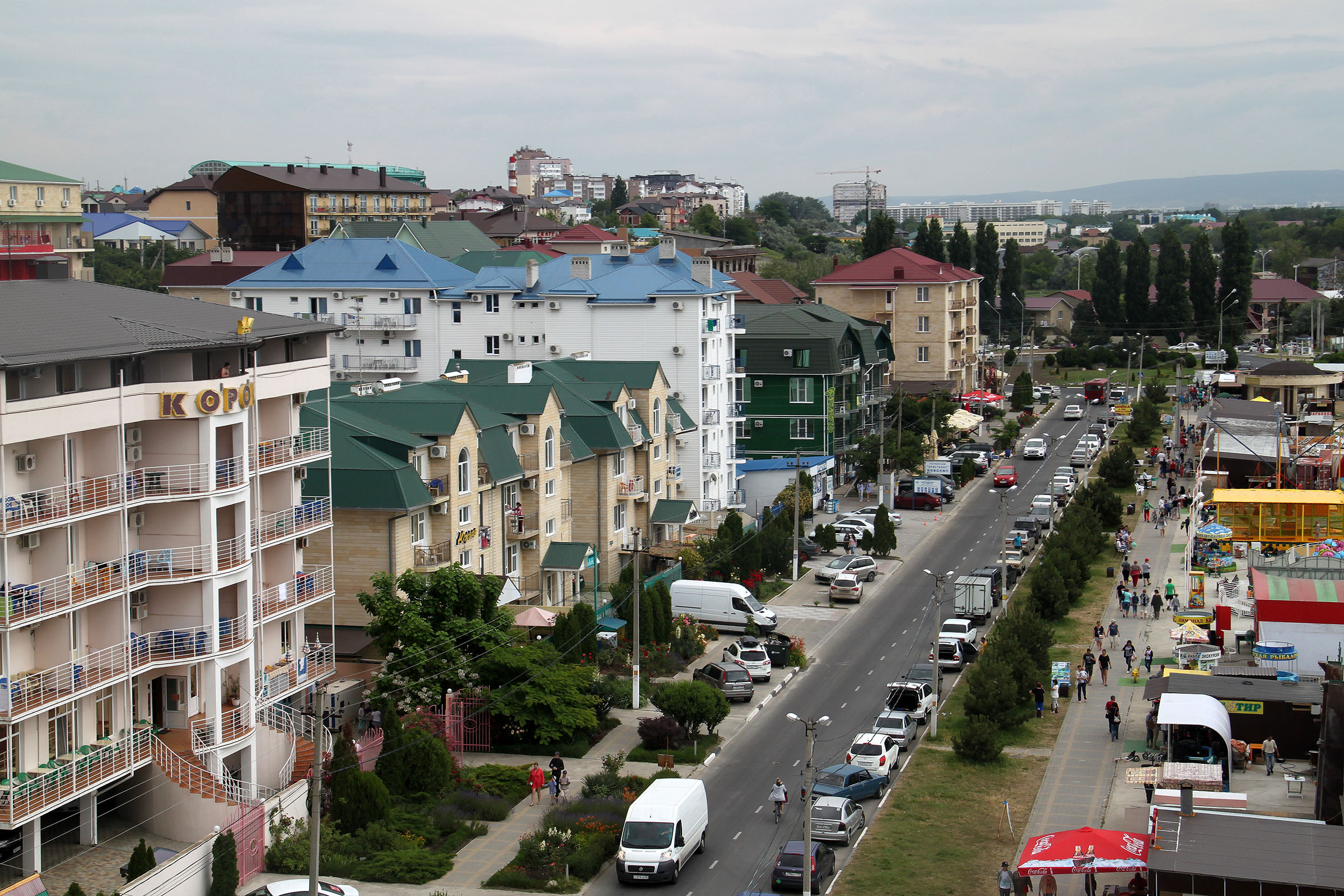 Витязево, Южный проспект, вид с колеса обозрения на юго-восток